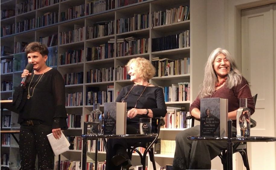 Buchlesung im Münchener Literaturhaus, 12 September 2017. (Mahbuba Maqsoodi: Person rechts)